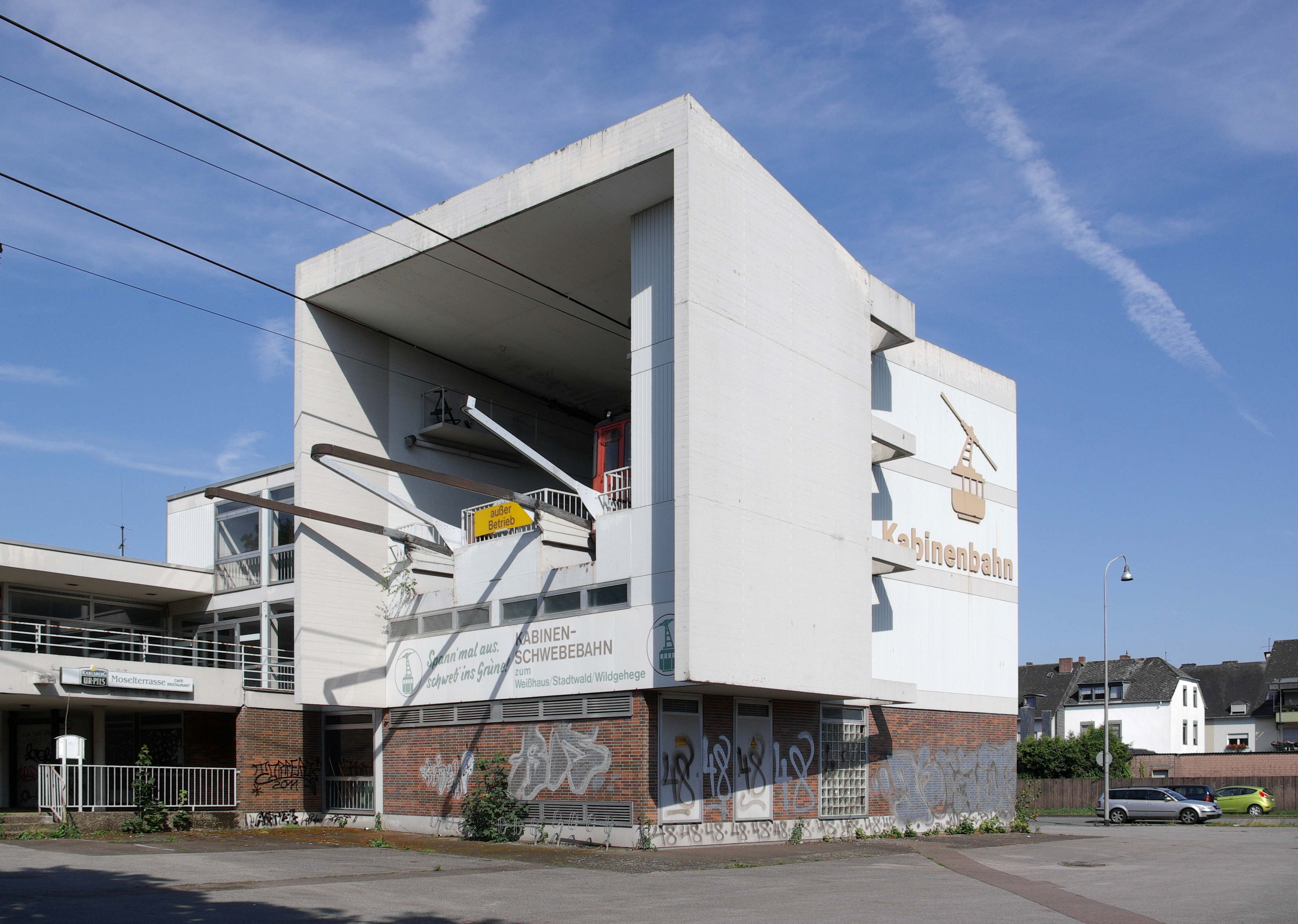 Kabinenbahn / Seilbahn Trier